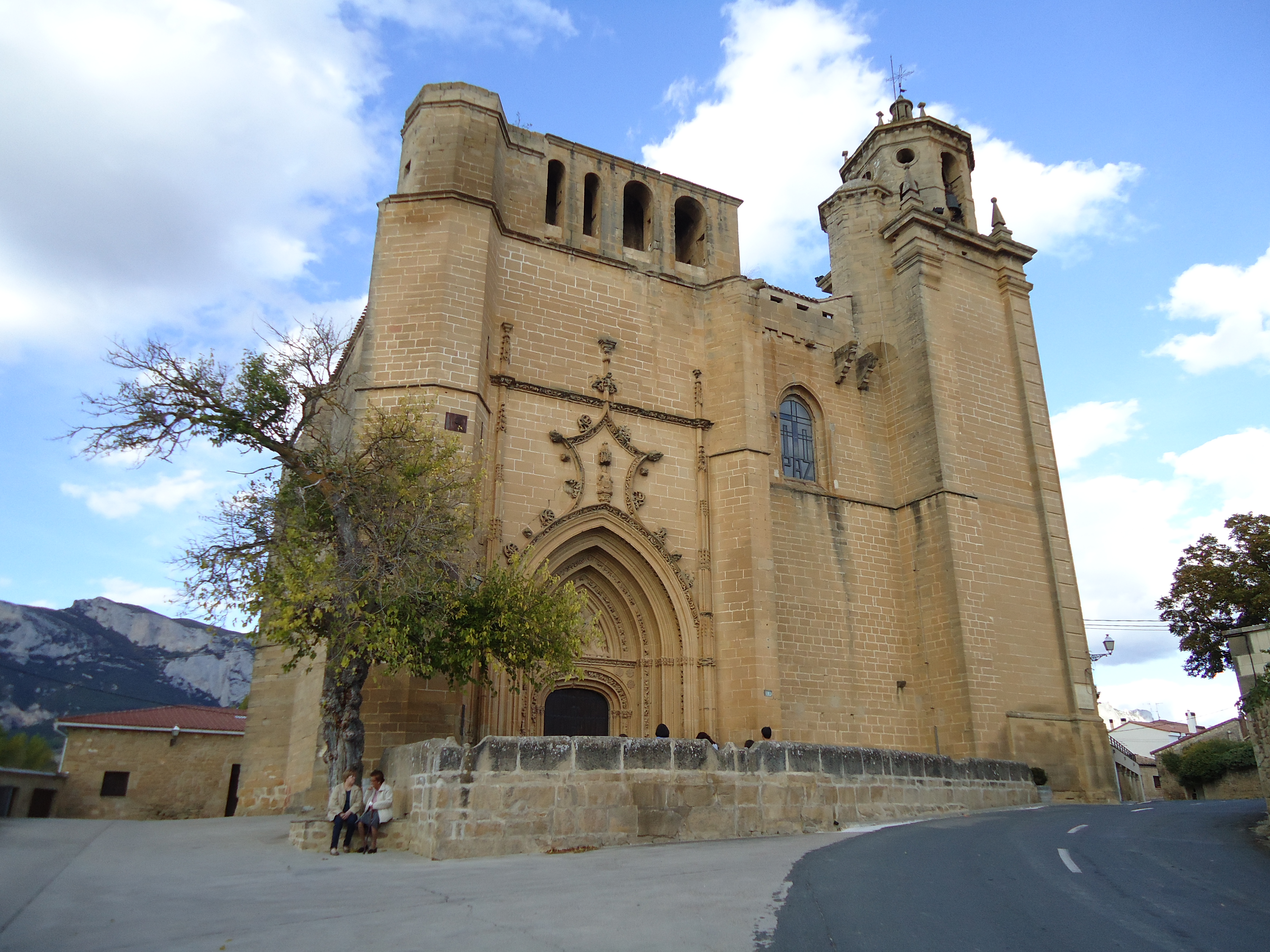 Lezako eliza